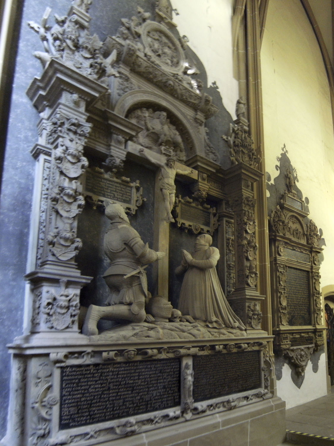 Schlossplatz 1: evangelische Schlosskirche; ehemalige Johanniterkirche, spätgotische Hallenkirche, 1479–1504, Architekt Philipp von Gmünd, 1766–1770 Innenumbau durch Philipp Heinrich Hellermann; Stützmauer mit spätgotischem Porta, bezeichnet 1484. Hier das Grabmal des Herzogs Wolfgang von Pfalz-Zweibrücken (1526-1569) und seiner Gemahlin Anna von Hessen (1529-1591) an der Nordwand der Schlosskirche. Das fast 7 m hohe Werk aus Turfstein wurde in dreijähriger Arbeit vom Bildhauer Johann von Trarbach geschaffen und war 1575 fertig. Lebensgroß knieen Herzog Wolfgang und Anna unter dem Gekreuzigten. Unter ihnen sind ihre Biographien angebracht. Hier steht u.a. Herzog Wolfgang habe u.a. den päpstlichen Götzendienst abgeschafft und Herzogin Anna habe 13 Kinder geboren.